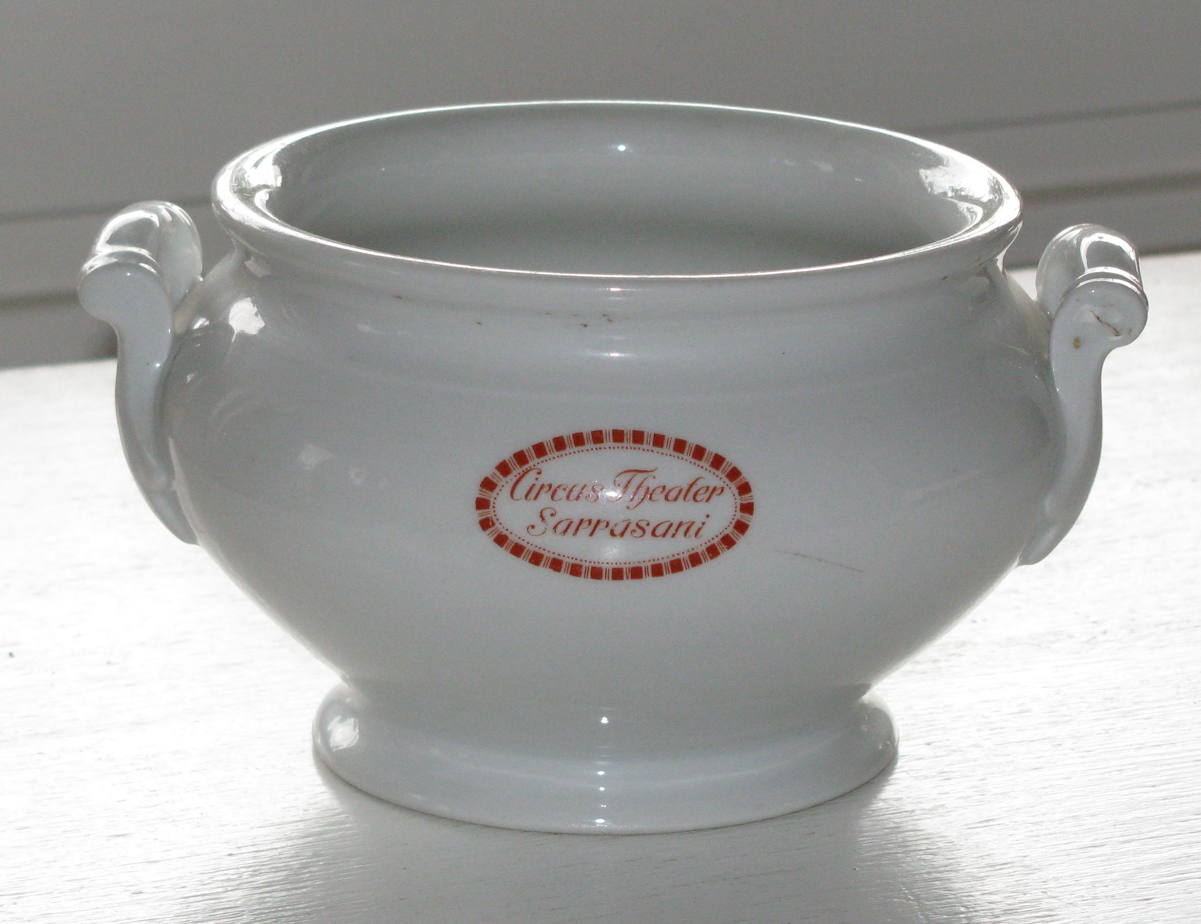 Suppentasse des Circus-Theaters Sarrasani, Dresden. Porzellan, vor dem 2. Weltkrieg. Marke: J. G. Klingner, Dresden